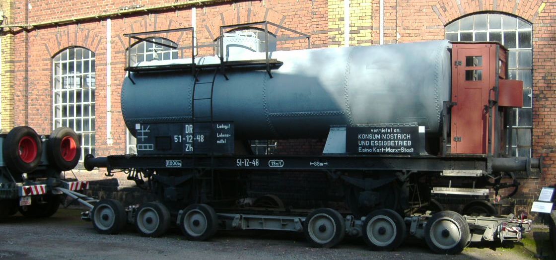 Kesselwagen mit Untergestell der Verbandsbauart, verladen auf einem Culemeyer-Straßenroller